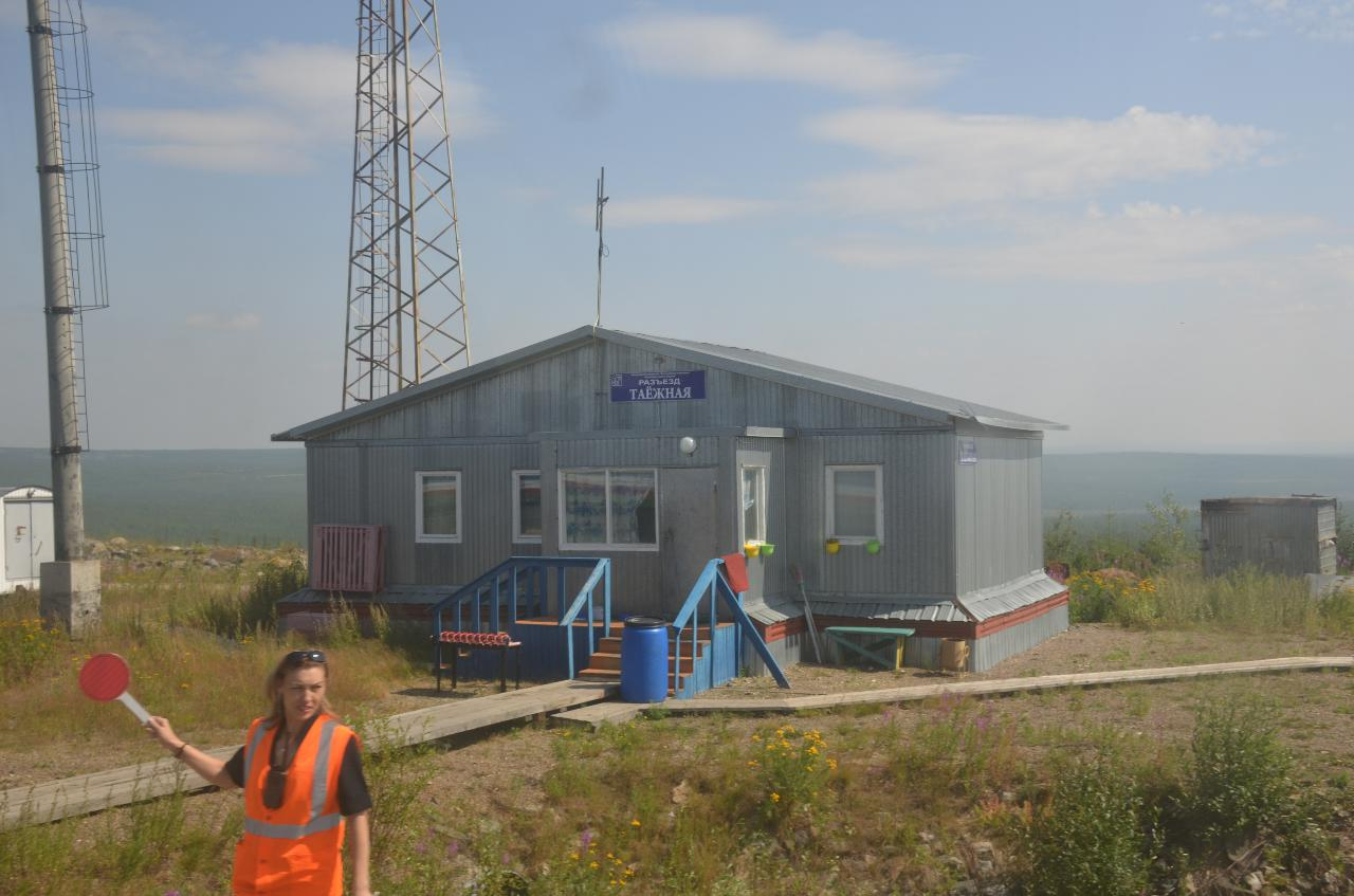 Поездка 5-6 августа 2019 г. по маршруту Якутск - Нерюнгри - Якутск во вновь назначенном поезде № 327 Нижний Бестях - Нерюнгри. Историческое событие - пуск пассажирского движения поездов из центральной Якутии, почти из Якутска.Железнодорожный разъезд Таежная (Таежный)